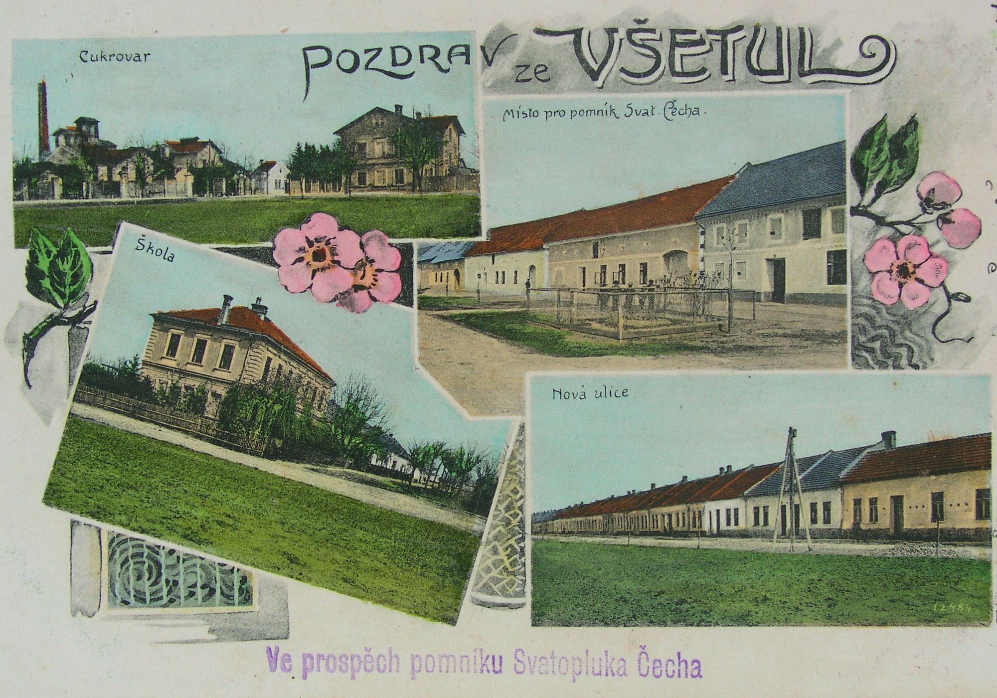 Česky: Stará pohlednice ze Všetul.